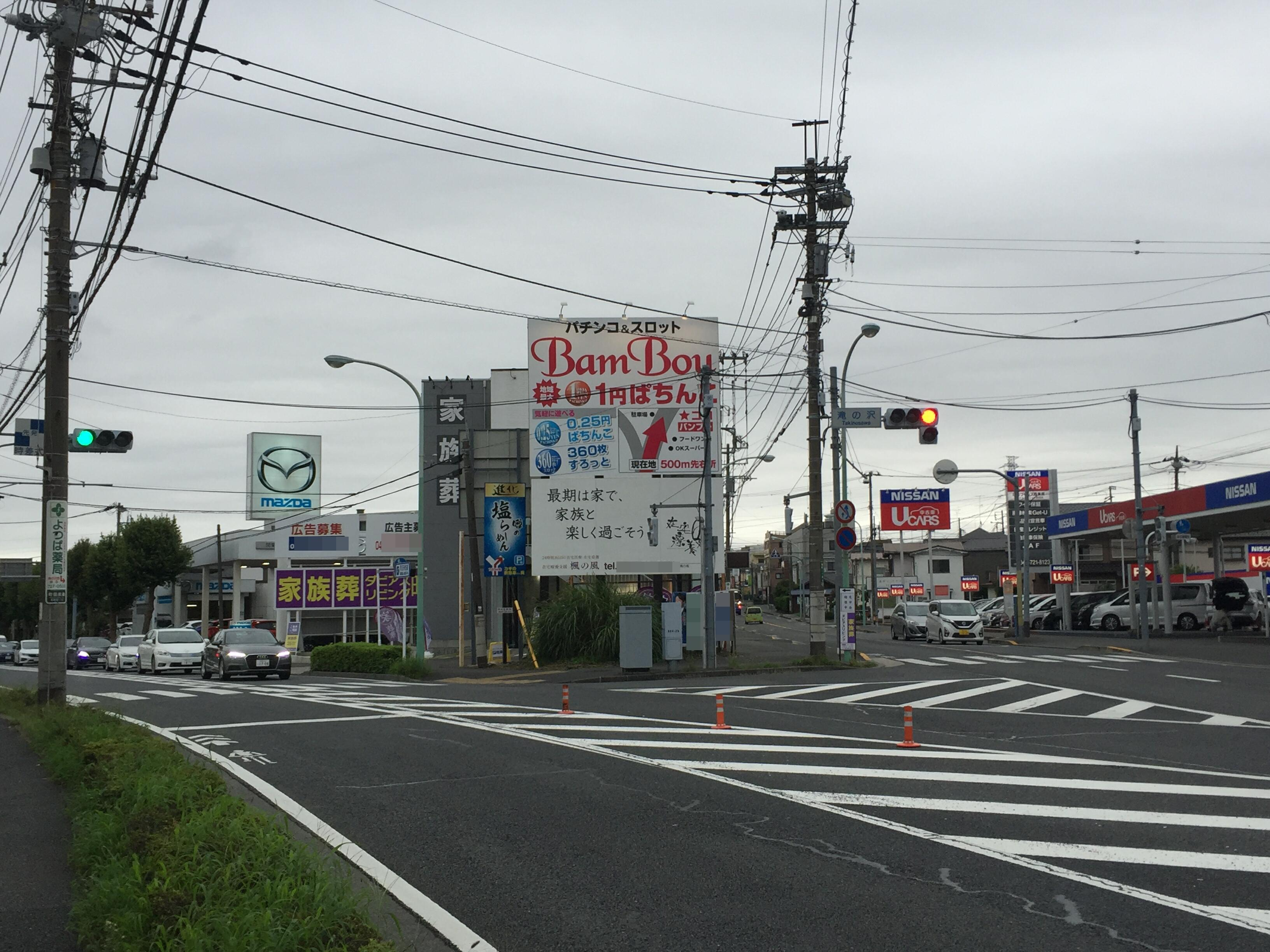 滝の沢交差点（東京都町田市）。左方向は新道、右方向は旧道に分かれる。町田駅方向に向かう路線バスの大半が右方向（旧道）へ向かう。